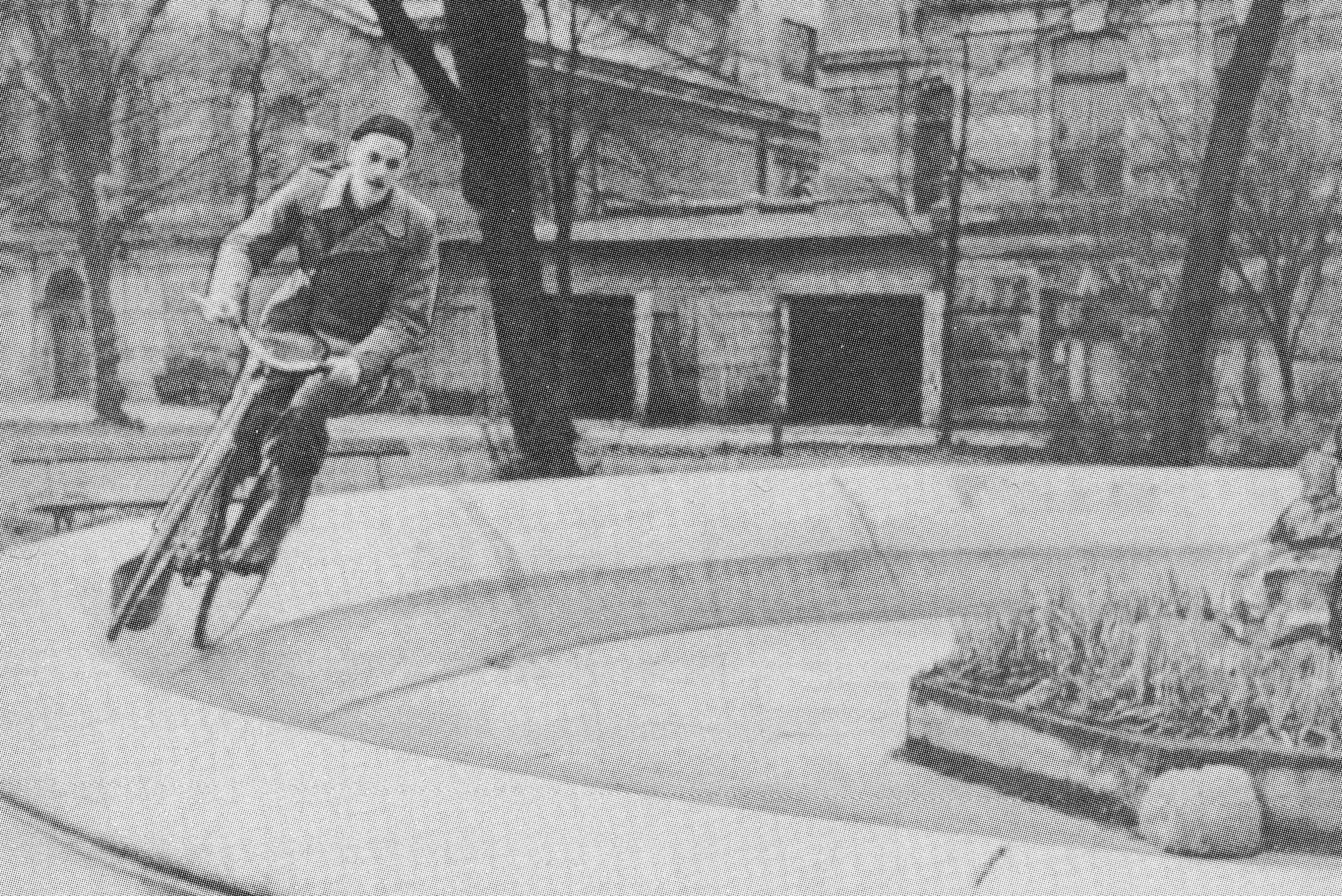 Maciej Aleksy Dawidowski podczas jazdy na rowerze po obrzeżu fontanny na dziedzińcu Politechniki Warszawskiej